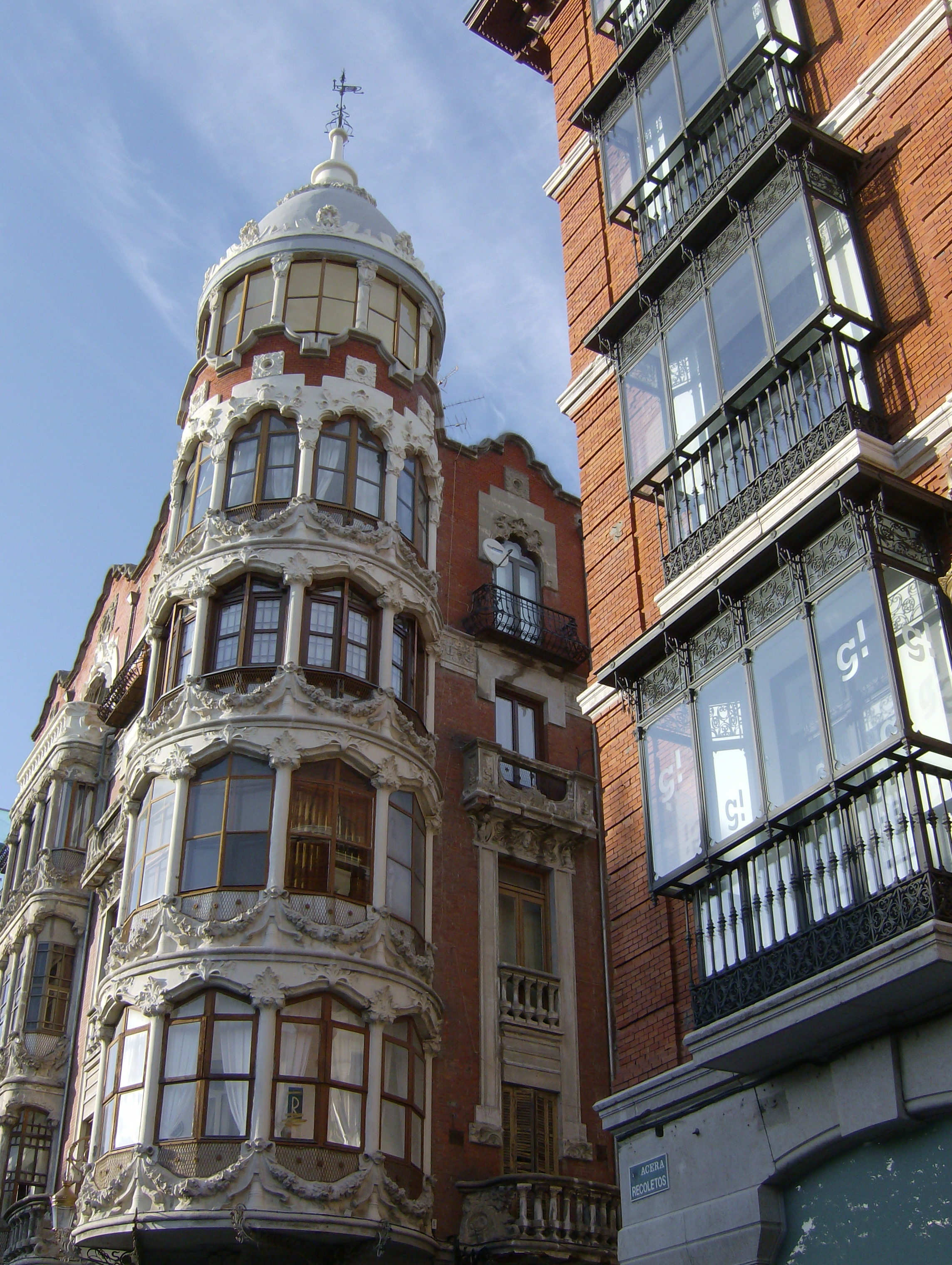 Acera de Recoletos, Valladolid